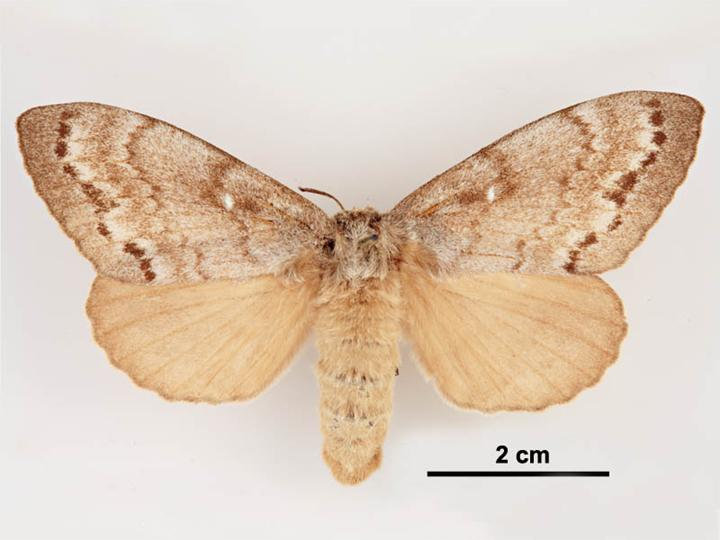 Dendrolimus superans sibirica female, dorsal view